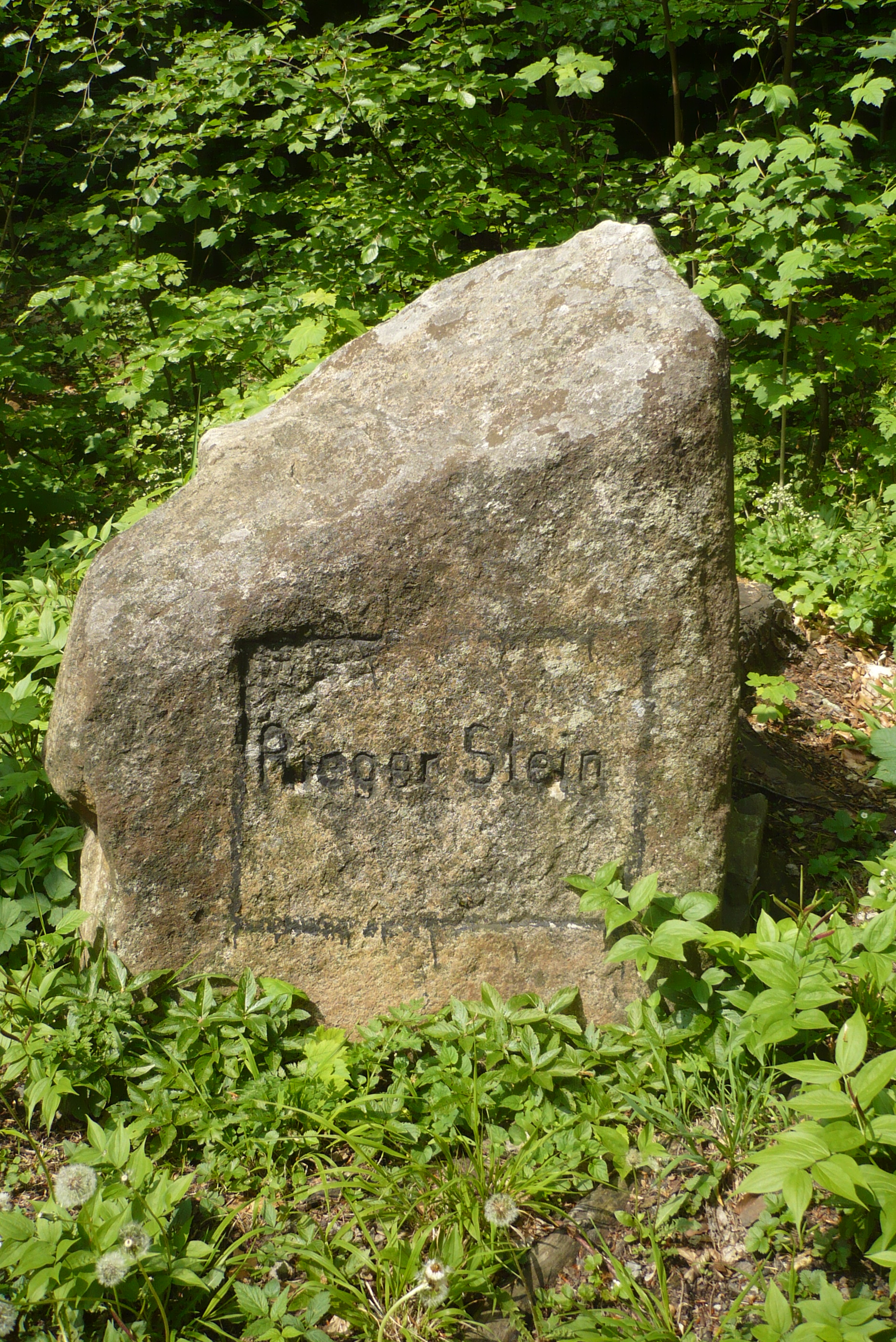 Złoty Stok